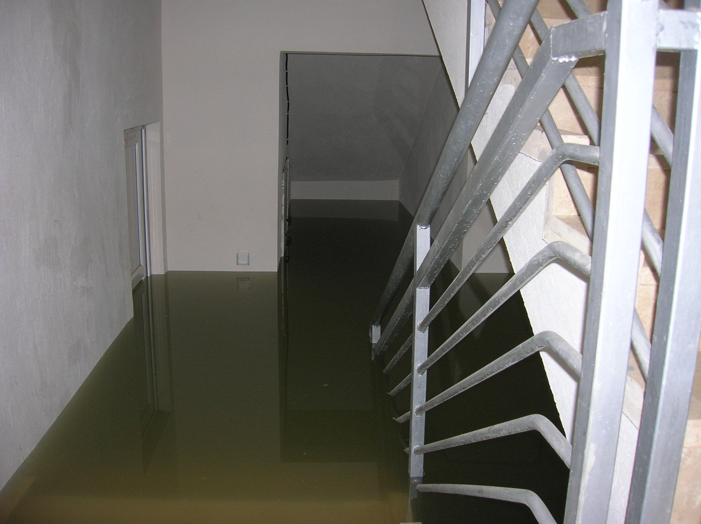 Zelfgemaakte foto, november 2006, (c) Erik1980: Een ondergelopen kelder na twee dagen onophoudelijke regenval in Side, Turkije.